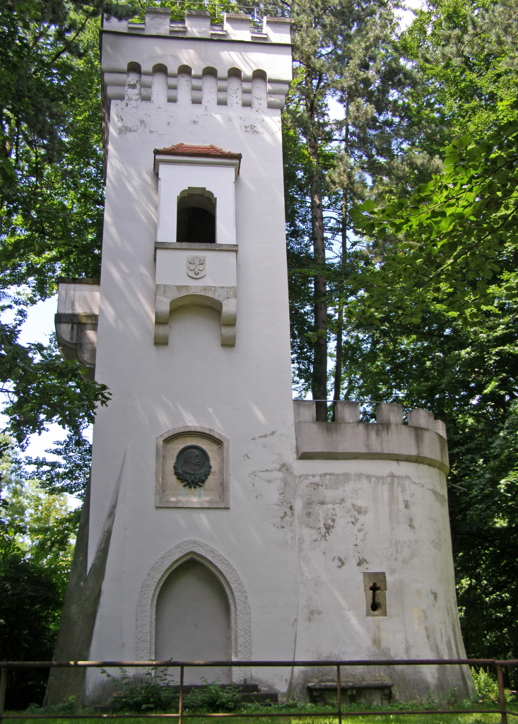 Bismarckturm in Memmingen